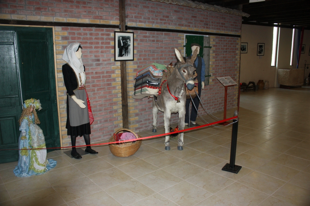 Im Museum von Acharavi